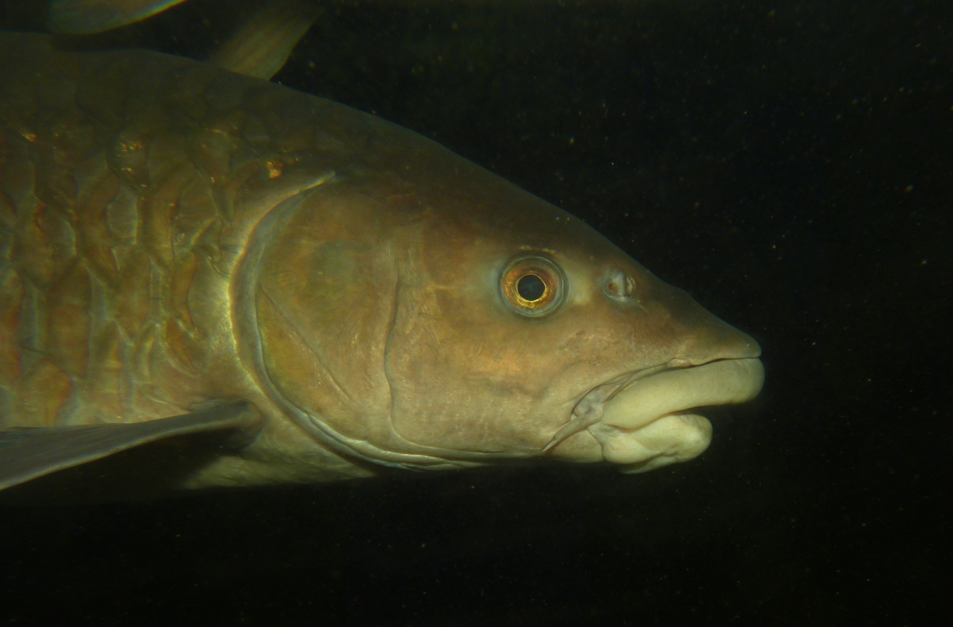 Headquarters Aquarium,Taman Negara NP, Pahang, MALAYSIA